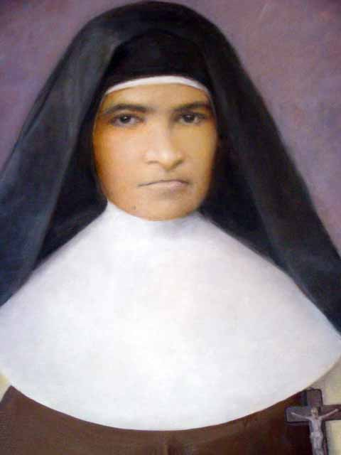 Pintura de la Beata Candelaria de San José Paz Castillo Ramírez, segunda Beata venezolana elevada a los Altares.